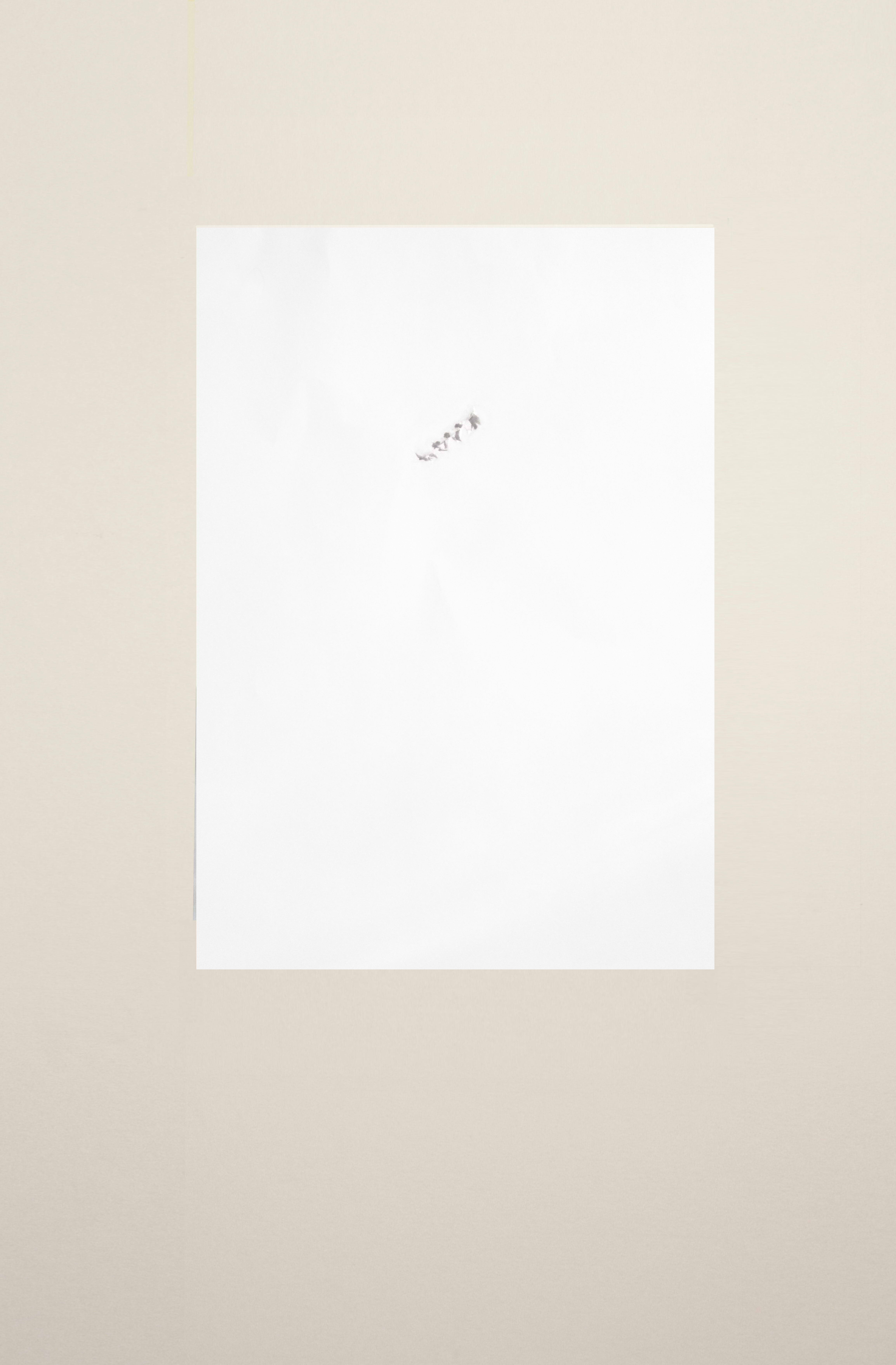 Villa A3